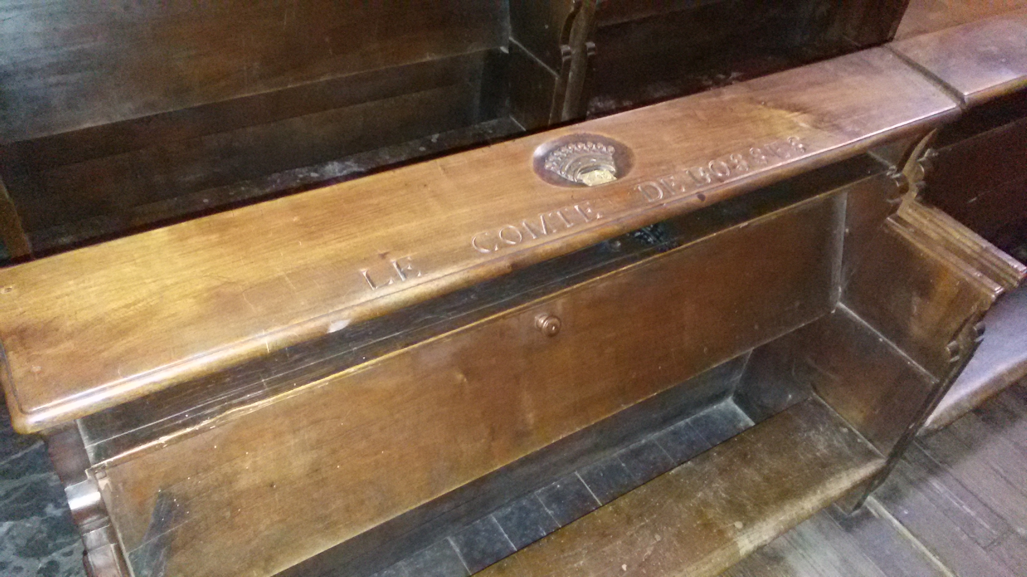 Banc des Comtes de Bosses à la cathédrale d'Aoste